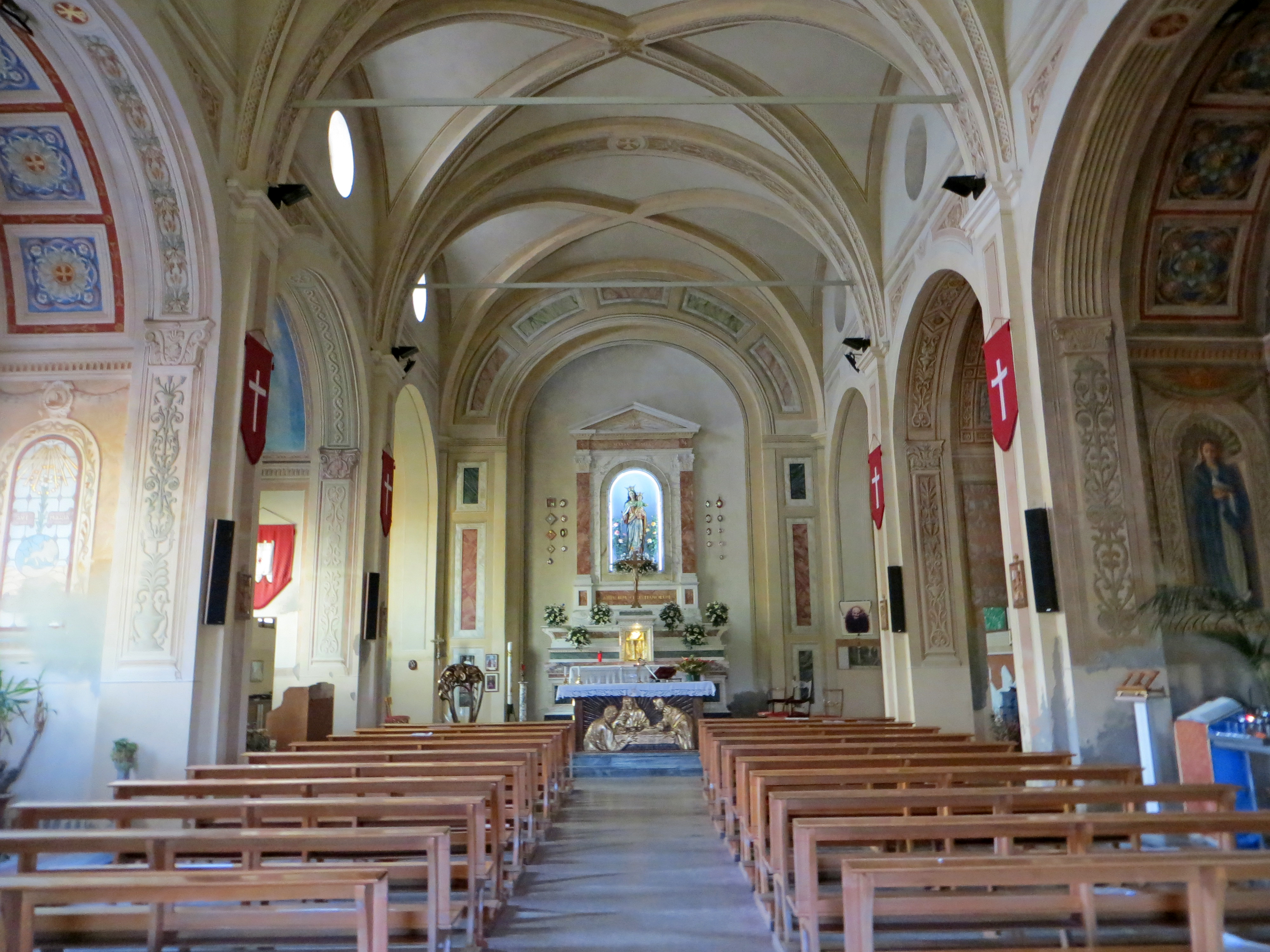 Convento di Santa Maria delle Grazie (Montechiarugolo) - navata del santuario